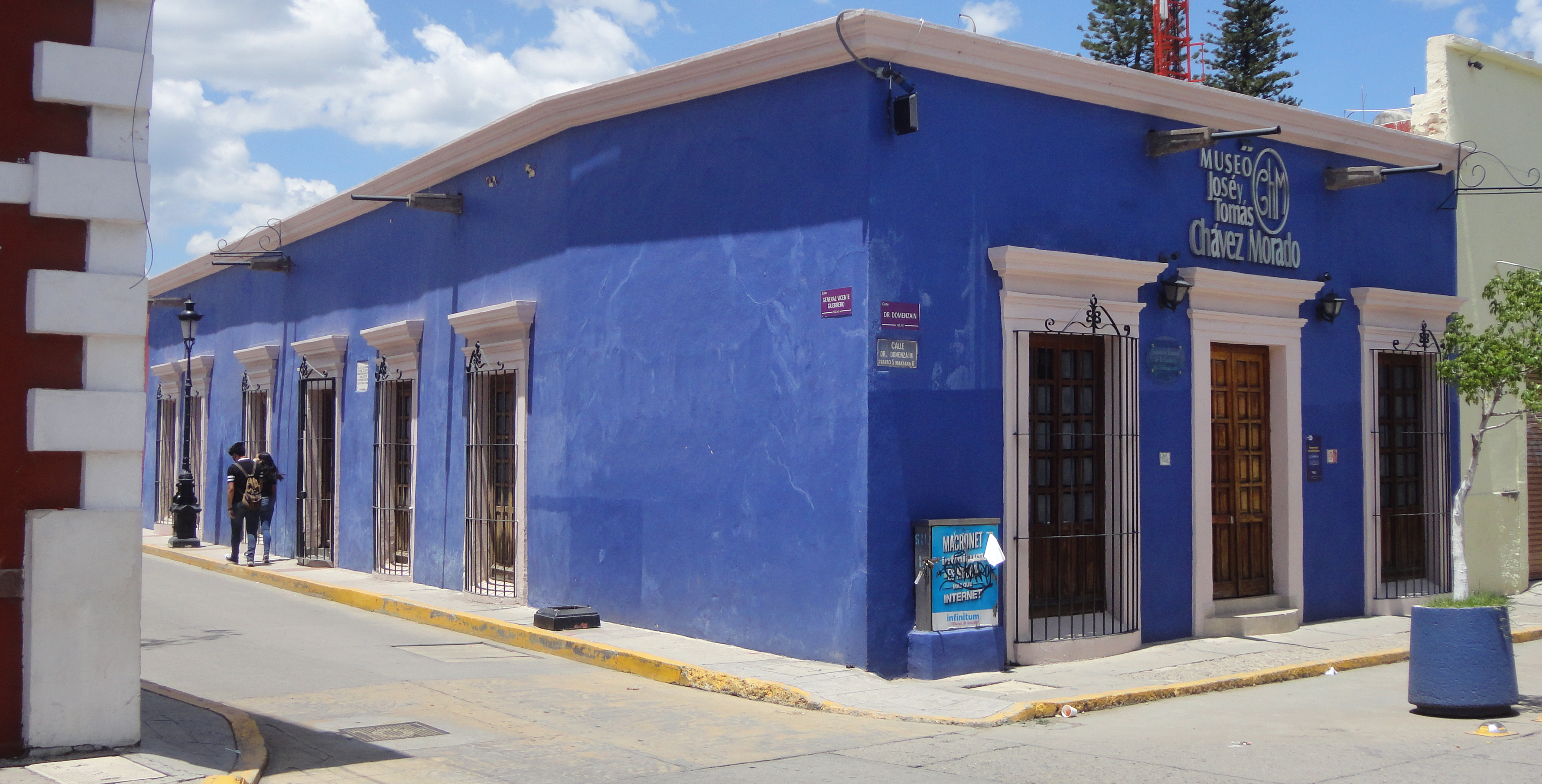 Casa de los hermanos José y Tomás Chávez Morado - Silao, Guanajuato, México.